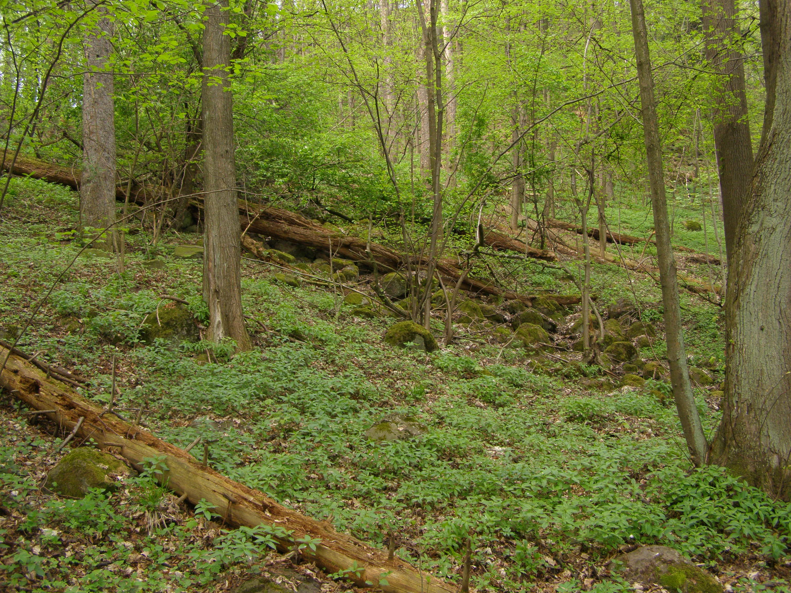 Česky: Frýdlantská pahorkatina, Přírodní rezervace Křížový vrch v katastru obce Frýdlant